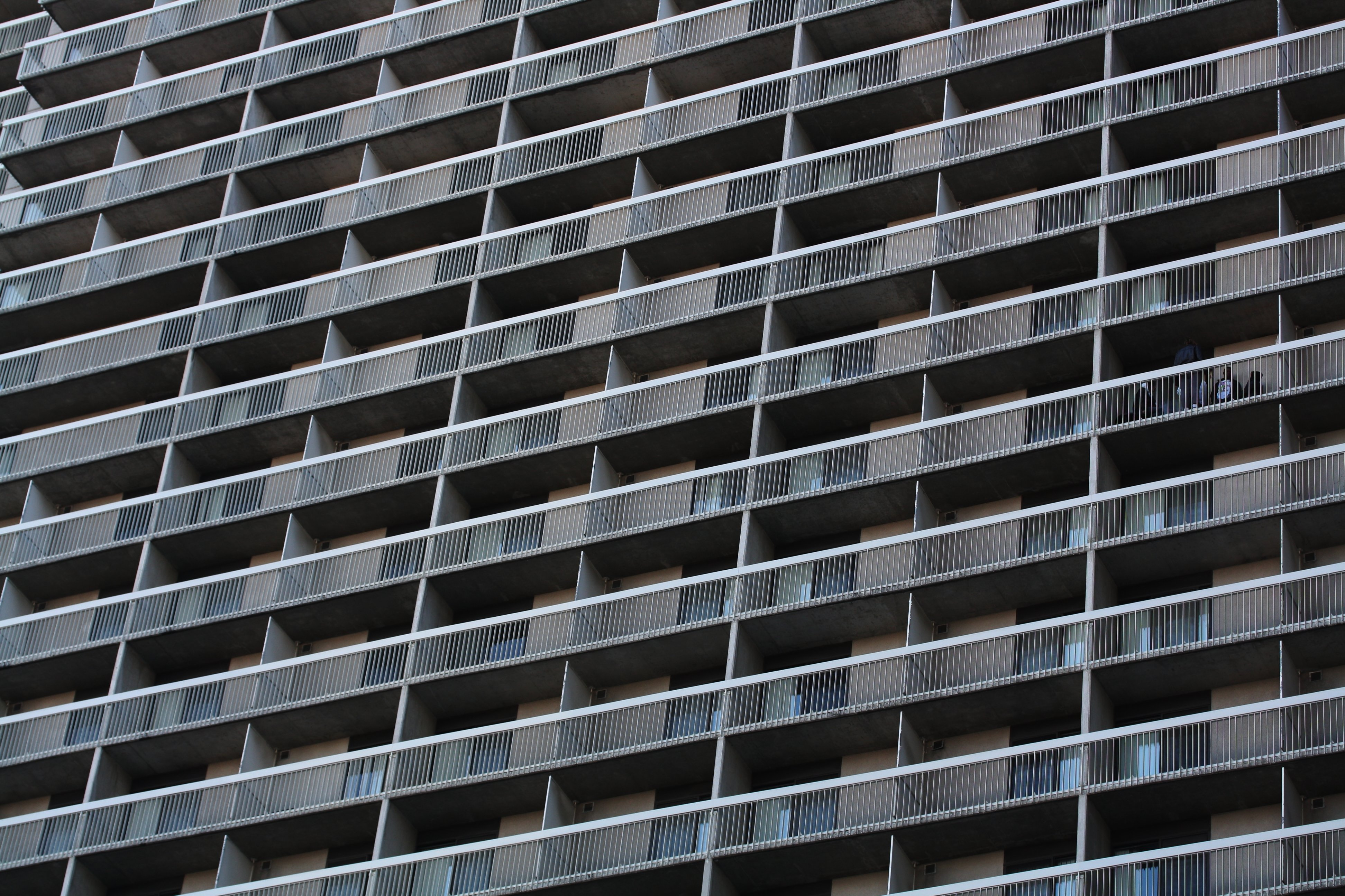 Delta Chelsea